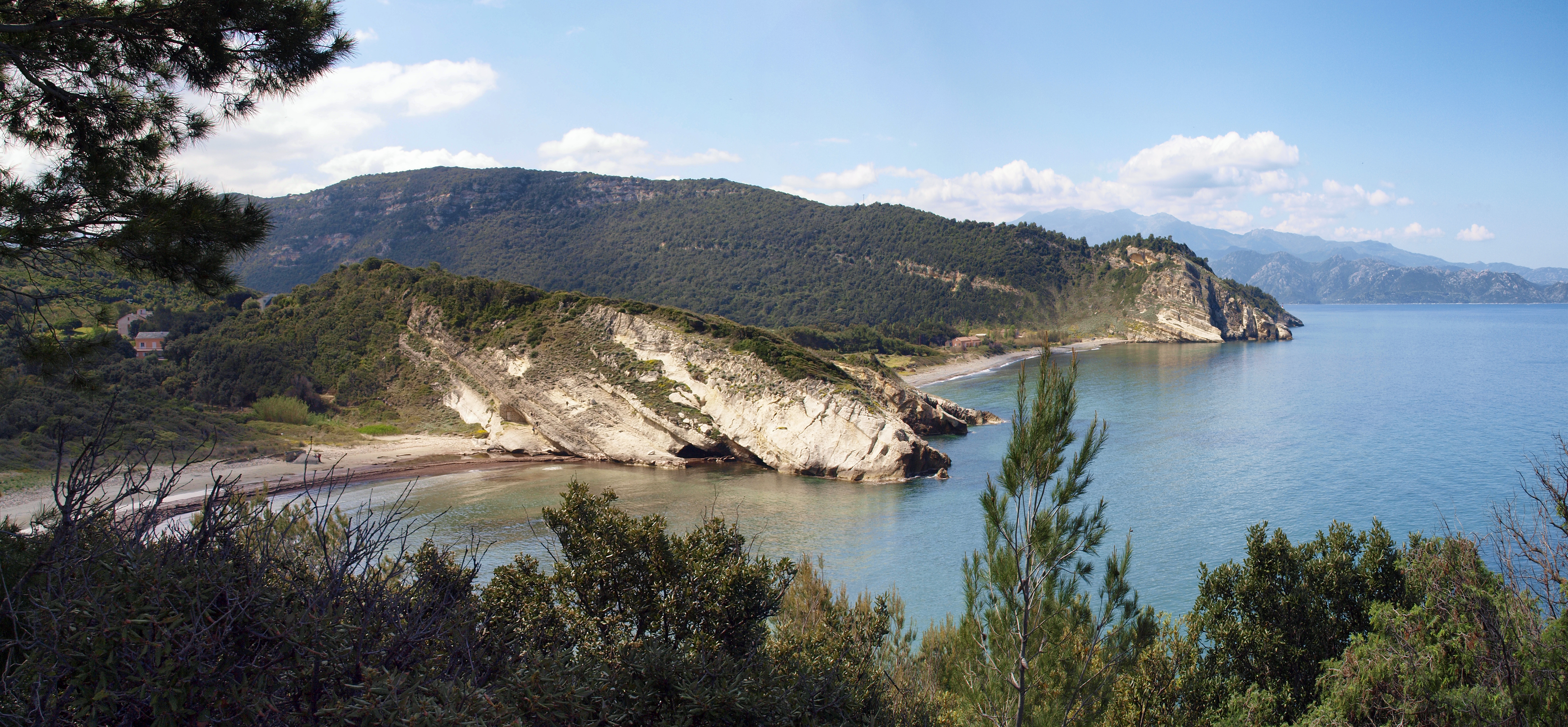 Farinole, Cap Corse - Secteur sud du littoral communal, délimité avec Patrimonio par l'embouchure du Fium'Albino, peu avant la pointe di Saeta (sur la droite).